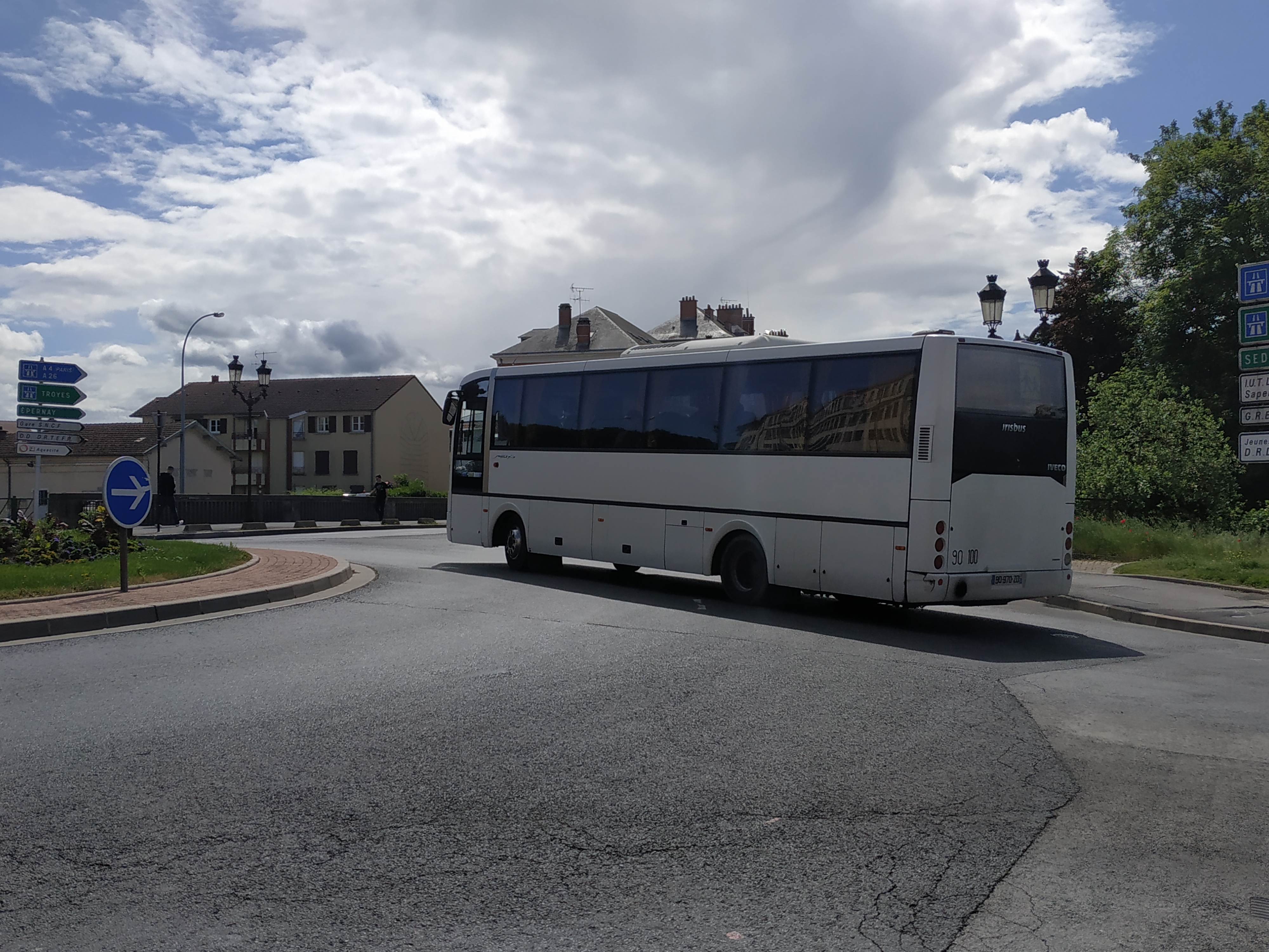 Irisbus Midys en circulation à Châlons-en-Champagne